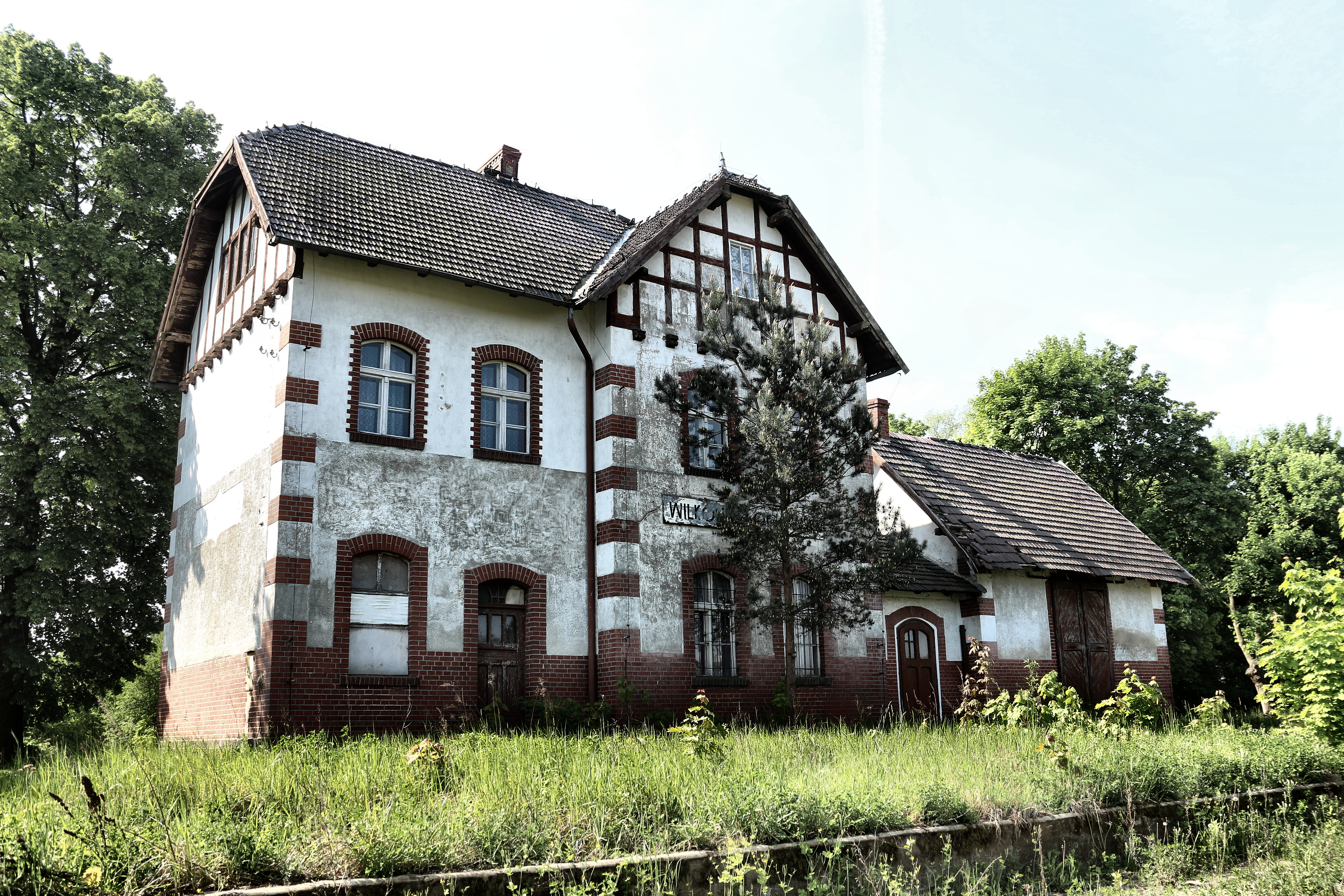 Wilków - przystanek kolejowy Wilków Głogowski.